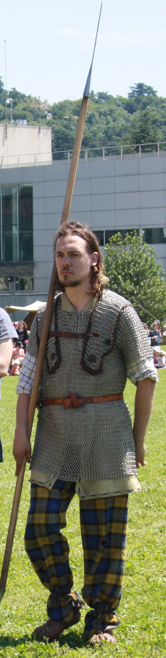 ambact